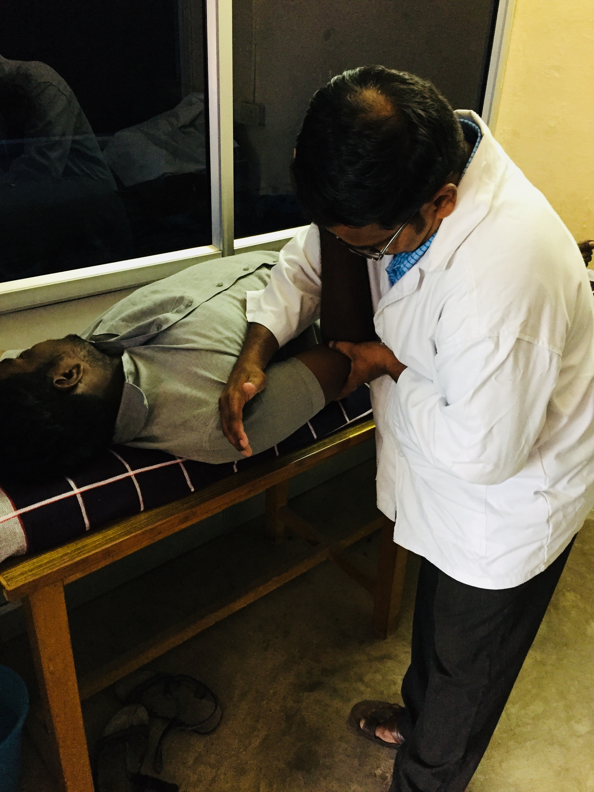 joints mobilization